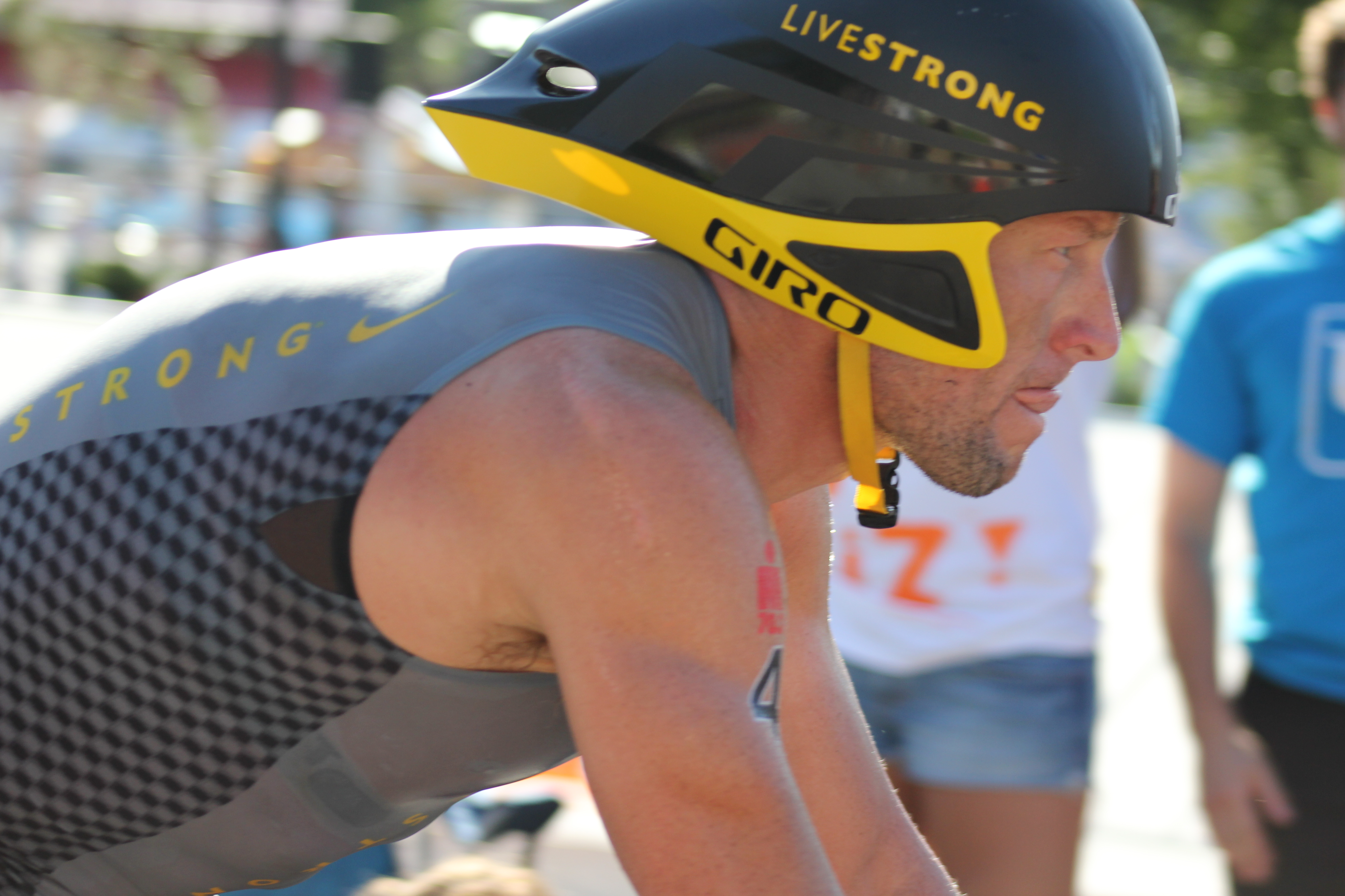 Lance Amstrong Ironman 70.3 Floride